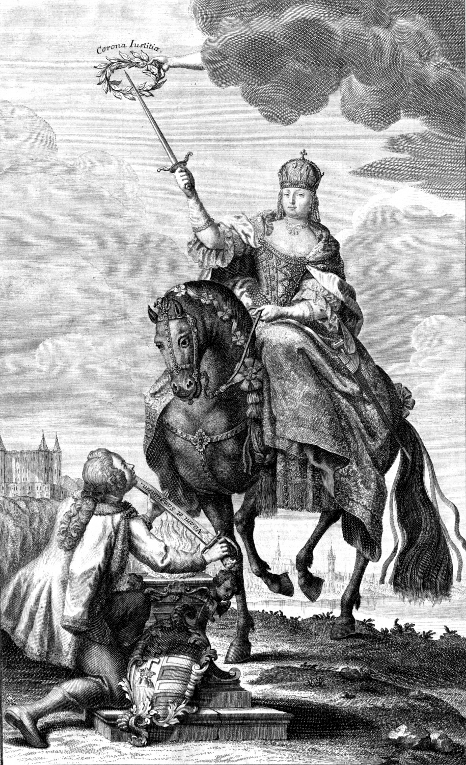 Maria Theresia, römisch-deutsche Kaiserin Beschreibung Reiterbildnis Maria Theresias mit einem knienden ungarischen Magnaten; im Hintergrund die Stadt Pressburg. Allegorie auf die Krönung Maria Theresias zur Königin von Ungarn am 25. Juni 1741 und das Gelöbnis des ungarischen Adels zur Unterstützung der Königin im Österreichischen Erbfolgekrieg am Pressburger Reichstag 1741.